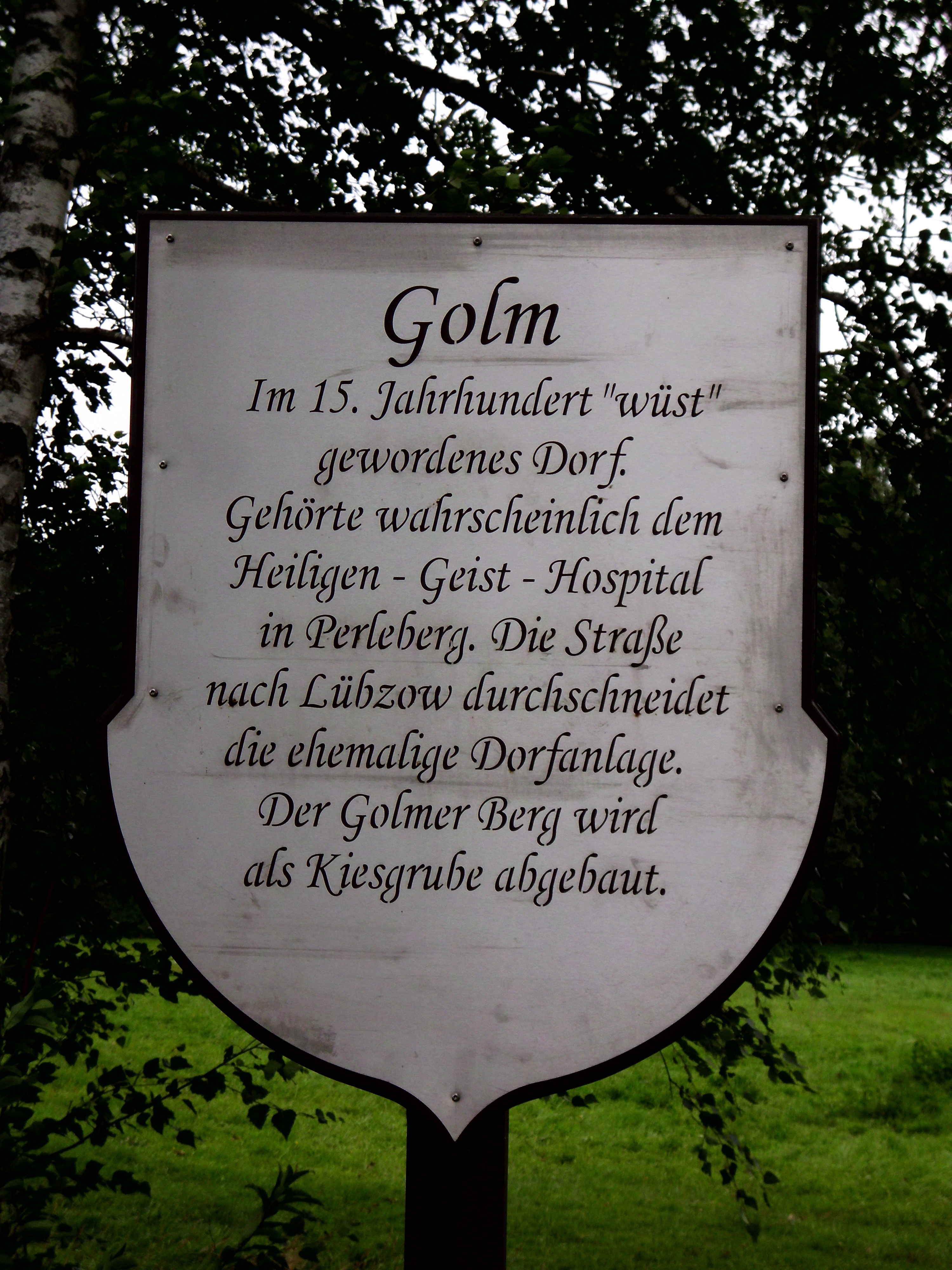 Informationsschild über das ehemalige Dorf Golm bei Lübzow